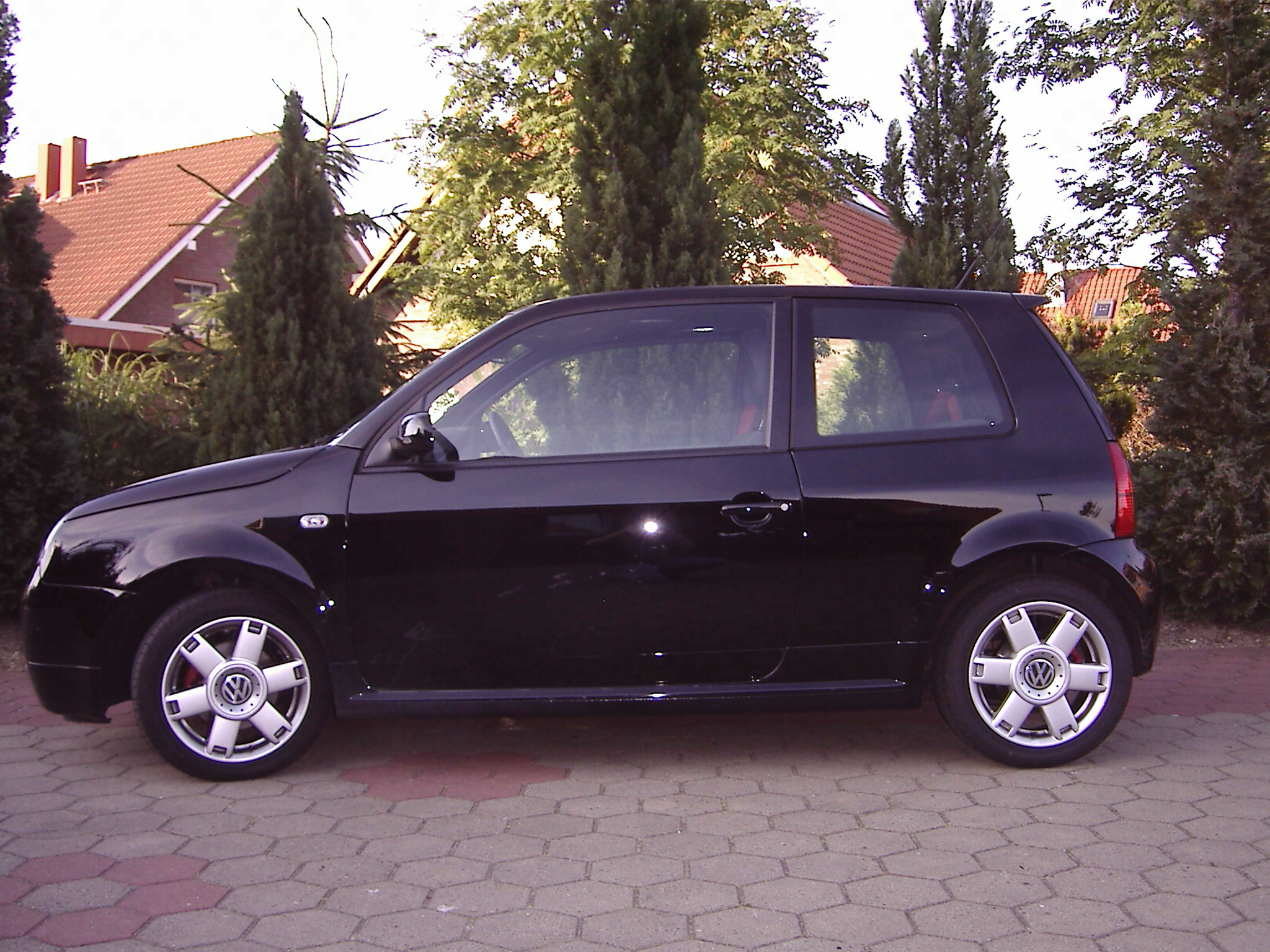 Der Lupo GTI von der Seite - Einer der zuletzt gebauten Volkswagen Lupo GTI im Juni 2005